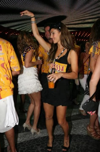 A atriz Fernanda de Freitas mostra que tem samba no pé ao som de Diogo Nogueira.